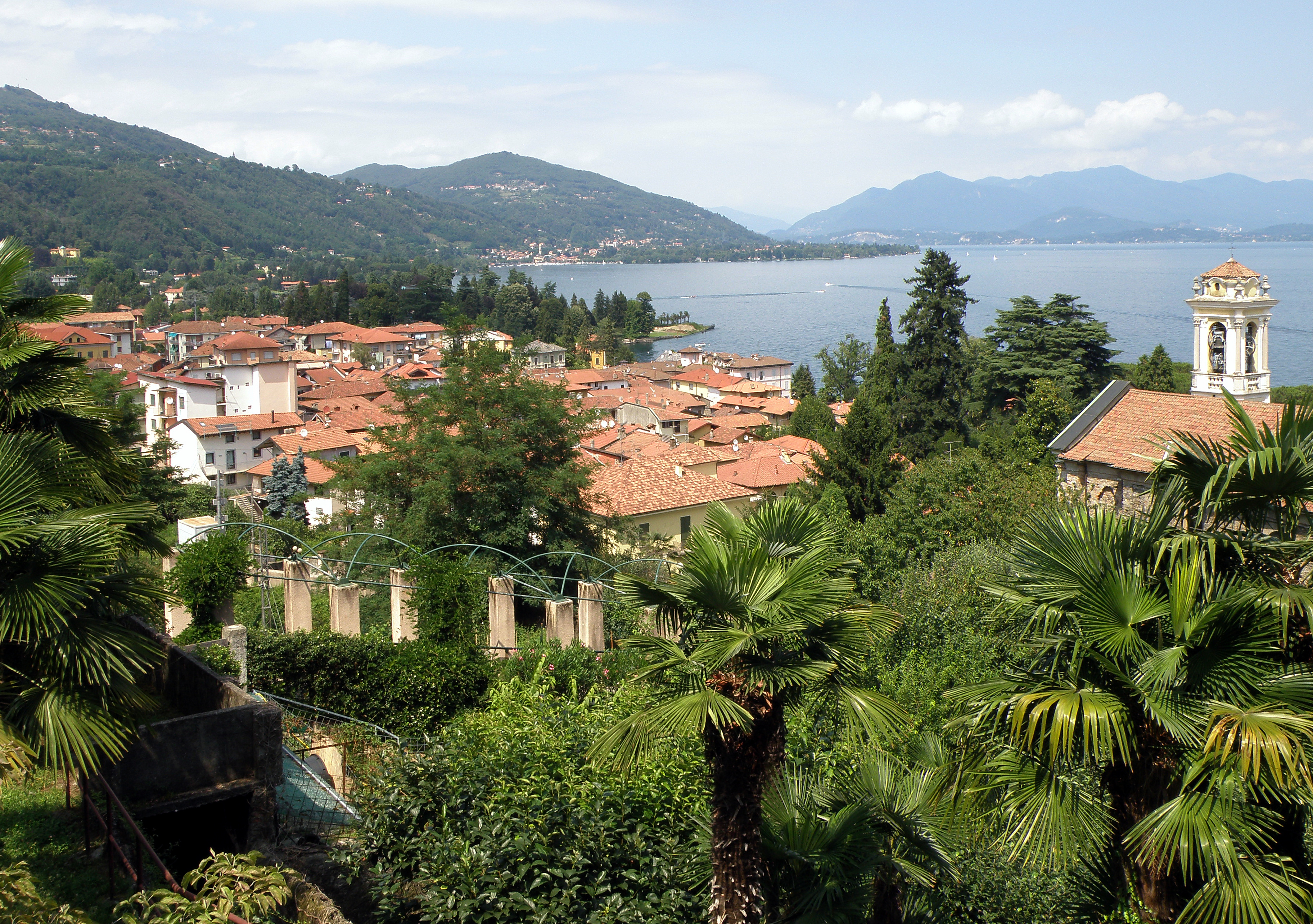 Meina (NO), sul Lago Maggiore. Veduta.